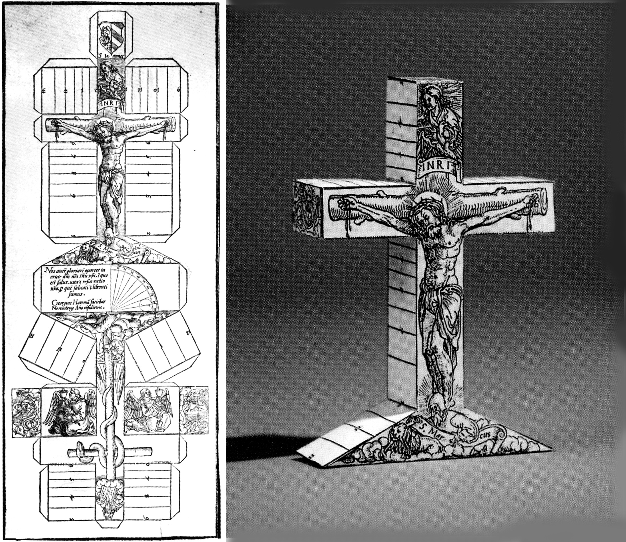 Träsnitt 44,5 x 17,5 cm tryckt i Nürnberg 1529 av G.Hartmann samt en byggd kopia av samma klippark. Krusifixet fungerade som ett flyttbart solur. Bilden hämtad från en utförlig presentation i "Zur Geschichte des Kartonmodellbaus", Heft 4, 2004. Publiceras här med tillstånd från Arbeitskreis Geschichte des Kartonmodellbaus.